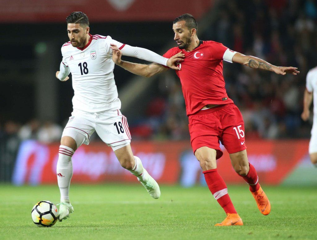 علیرضا جهانبخش در حال بازی برای تیم فوتبال ایران